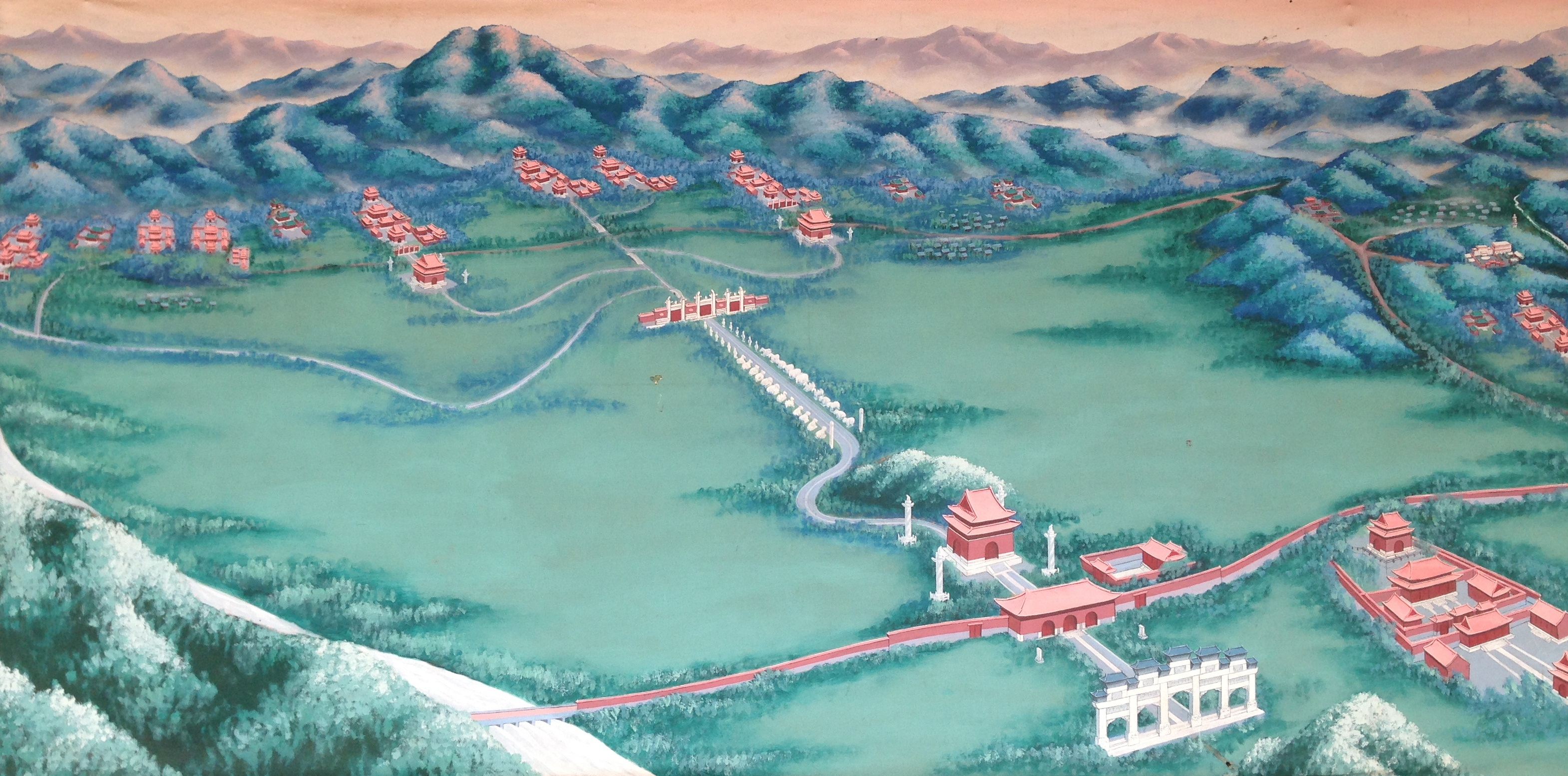 Layout över de Östra Qinggravrana